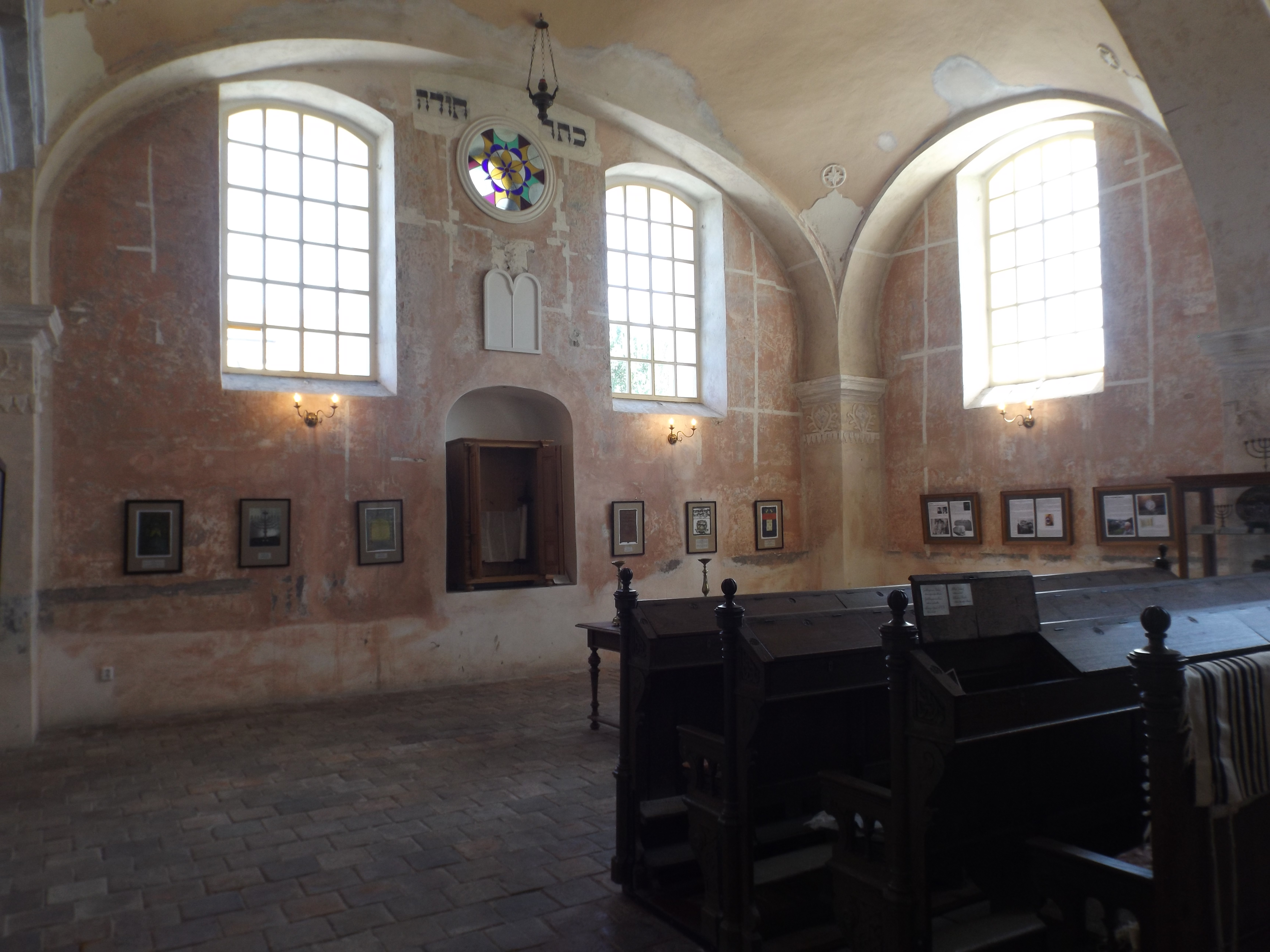 Interior of Loštice synagogue